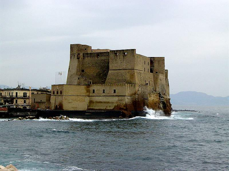 Castel Dell'Ovo, Napoli, ItaliaCastel Dell'Ovo